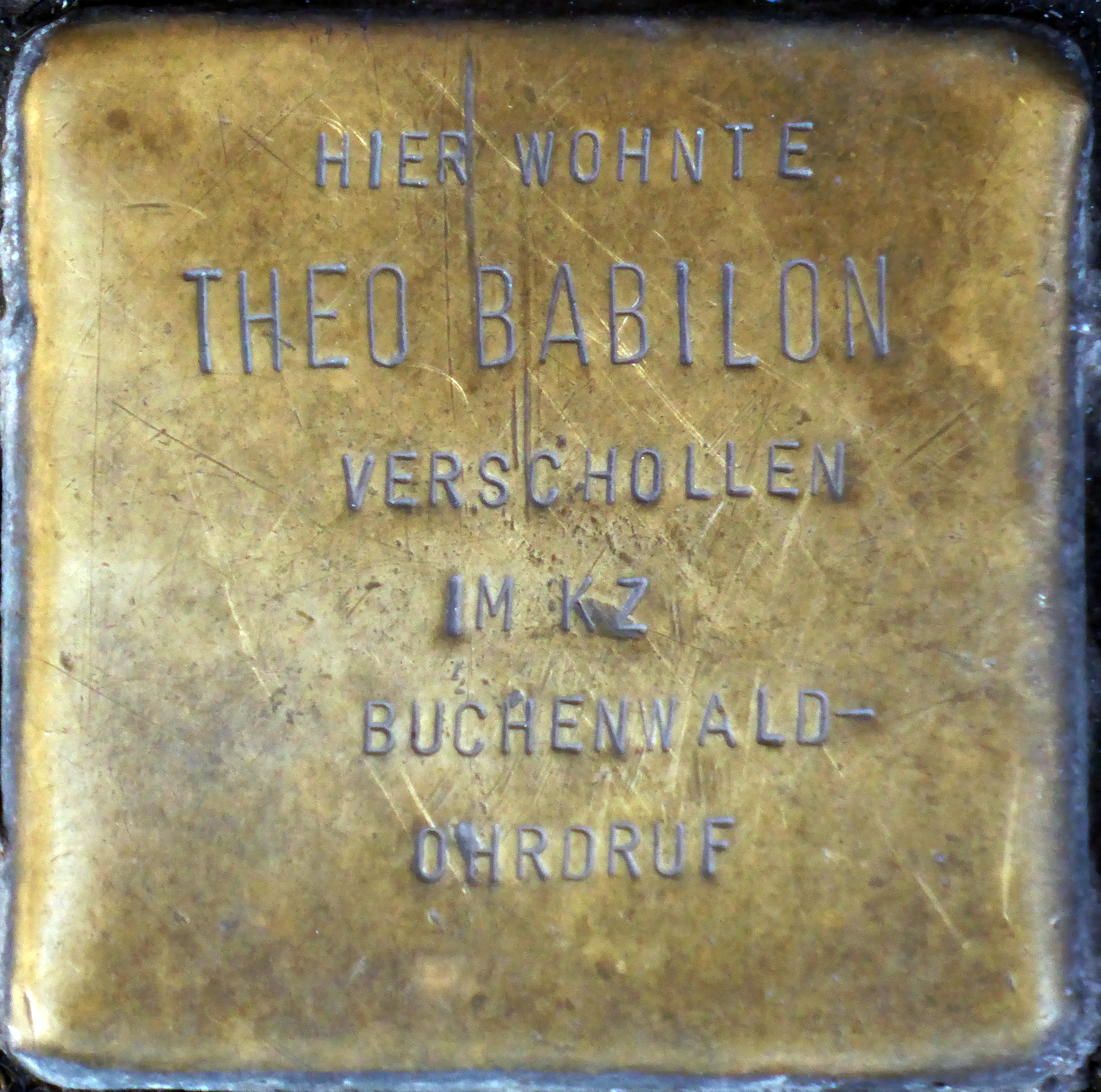 Stolperstein: Theo Babilon, Breite Straße 118, Köln